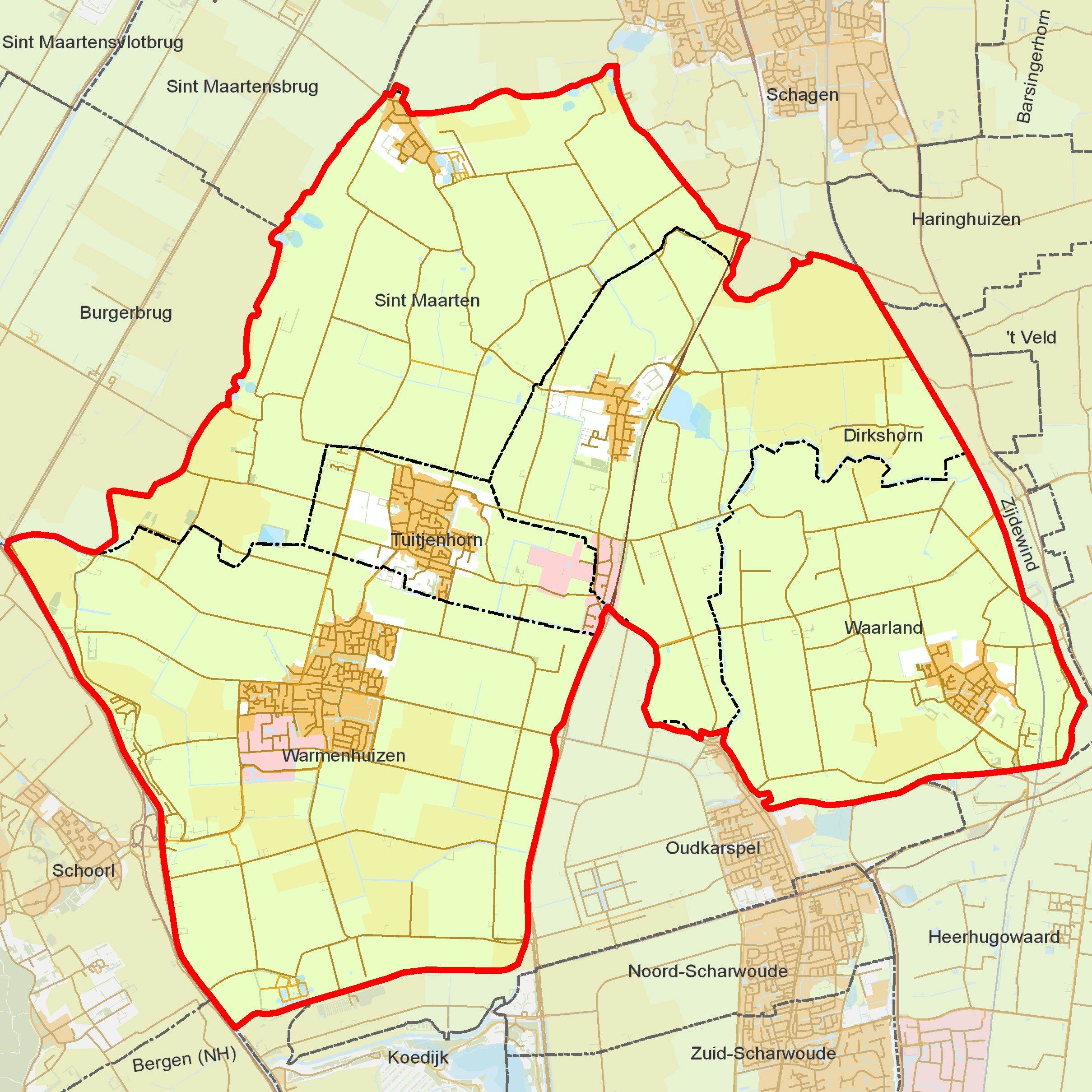 BAG woonplaatsen - Gemeente Harenkarspel.png